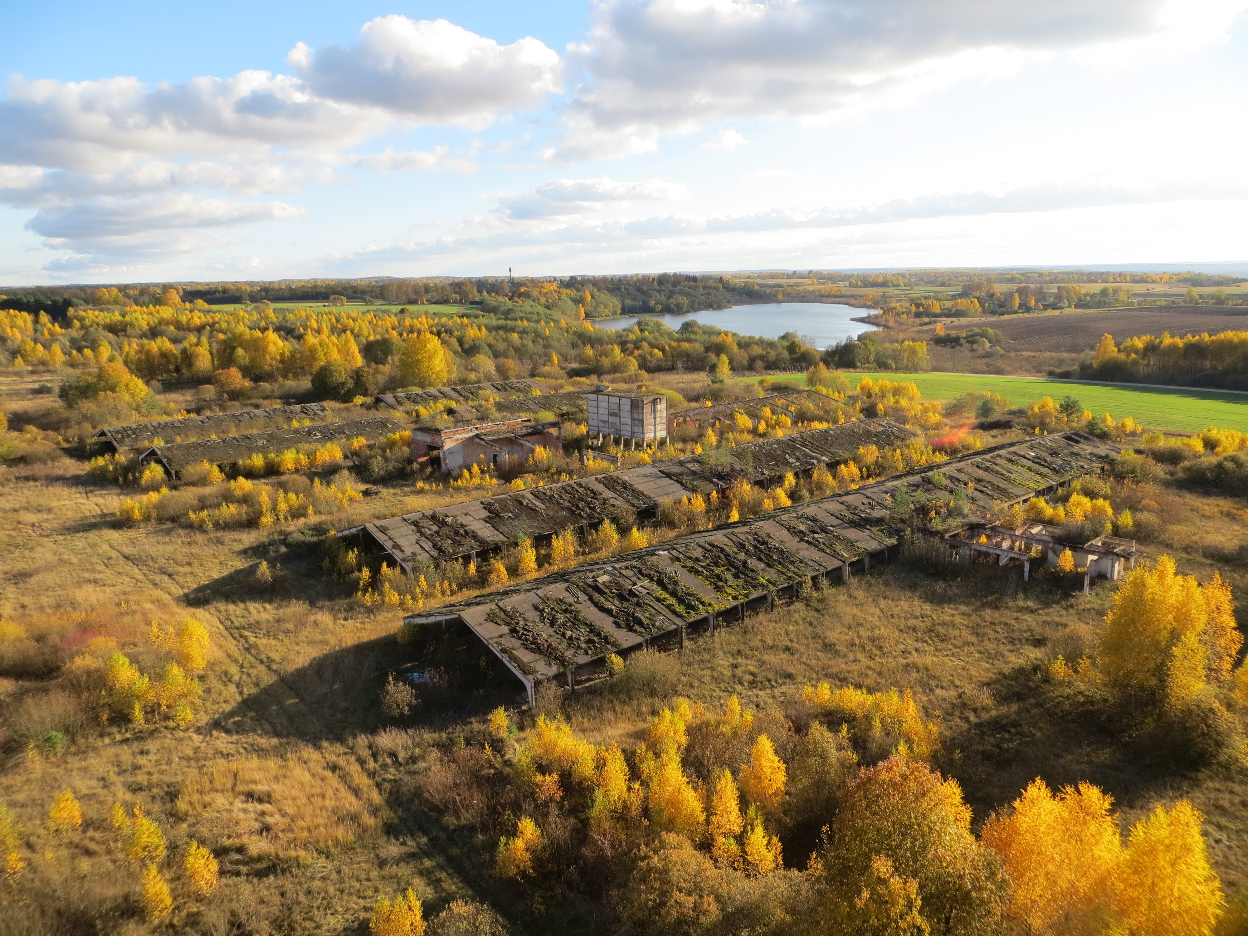 Miežionys 14230, Lithuania